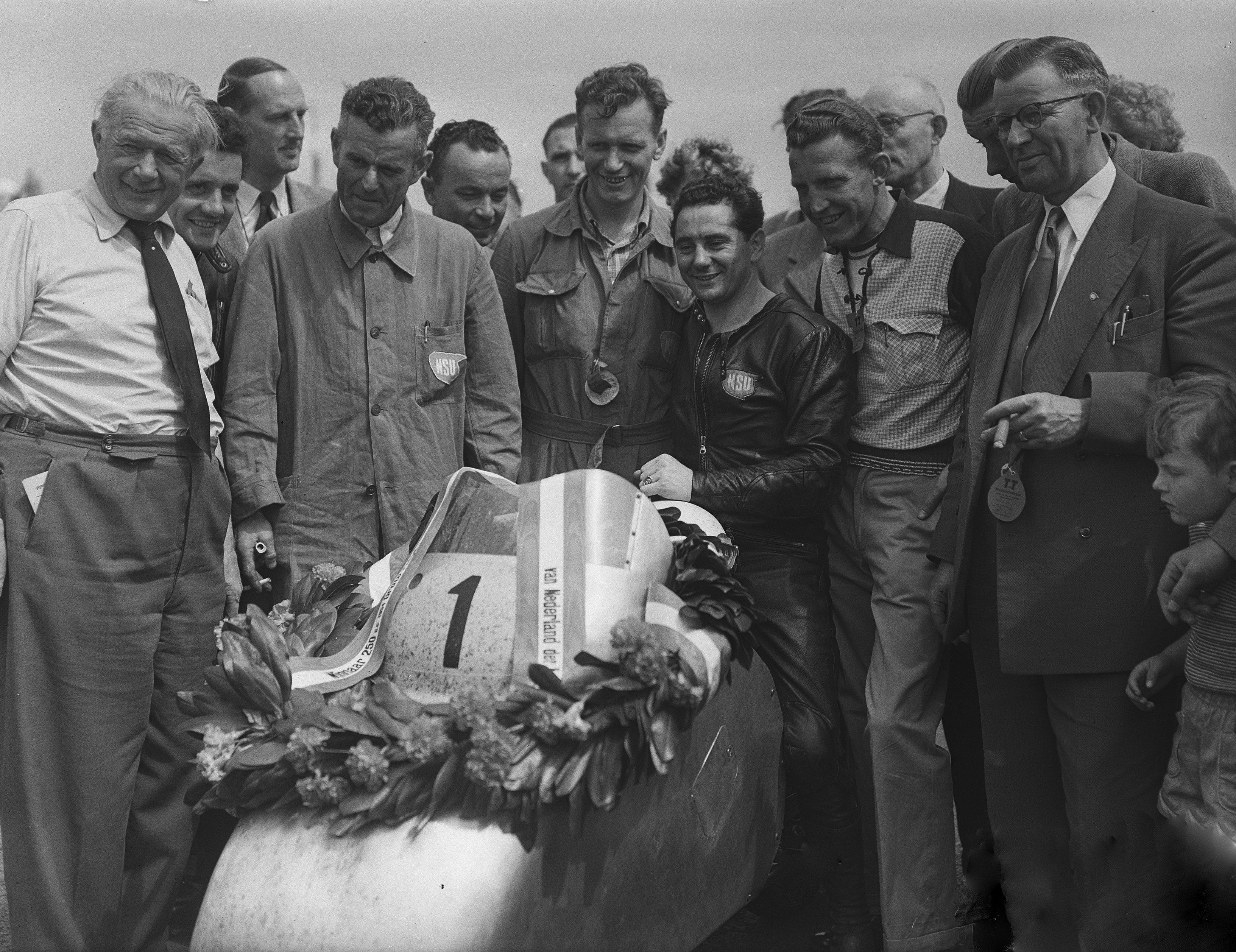 Collectie / Archief : Fotocollectie Anefo Reportage / Serie : [ onbekend ] Beschrijving : TT races Assen , Werner Haas (NSU) wint 250cc Datum : 10 juli 1954 Persoonsnaam : Haas, Werner Fotograaf : Bilsen, Joop van / Anefo Auteursrechthebbende : Nationaal Archief Materiaalsoort : Glasnegatief Nummer archiefinventaris : bekijk toegang 2.24.01.09 Bestanddeelnummer : 906-5860